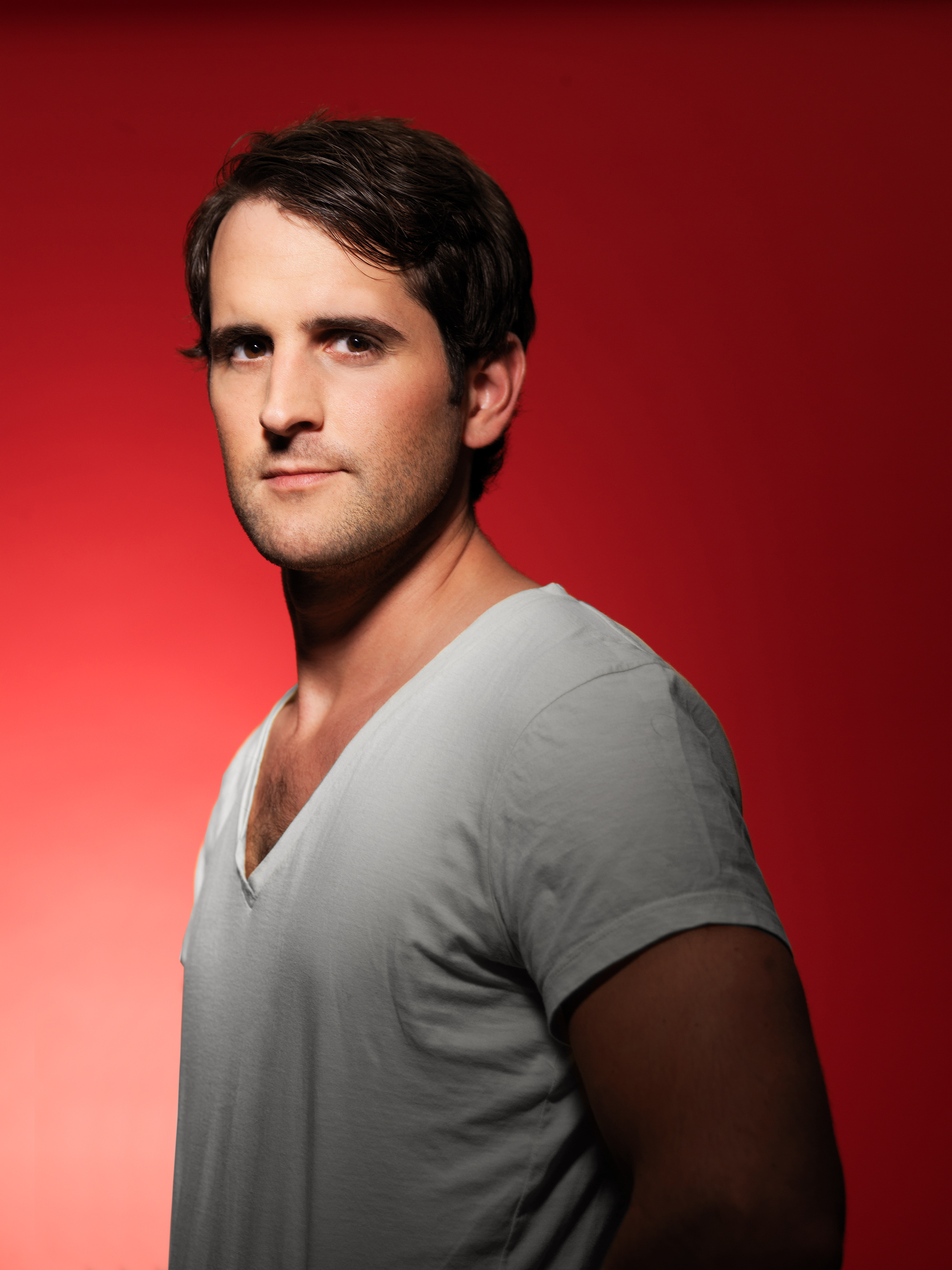 Skådespelaren och sångaren Philip Jalmelid.